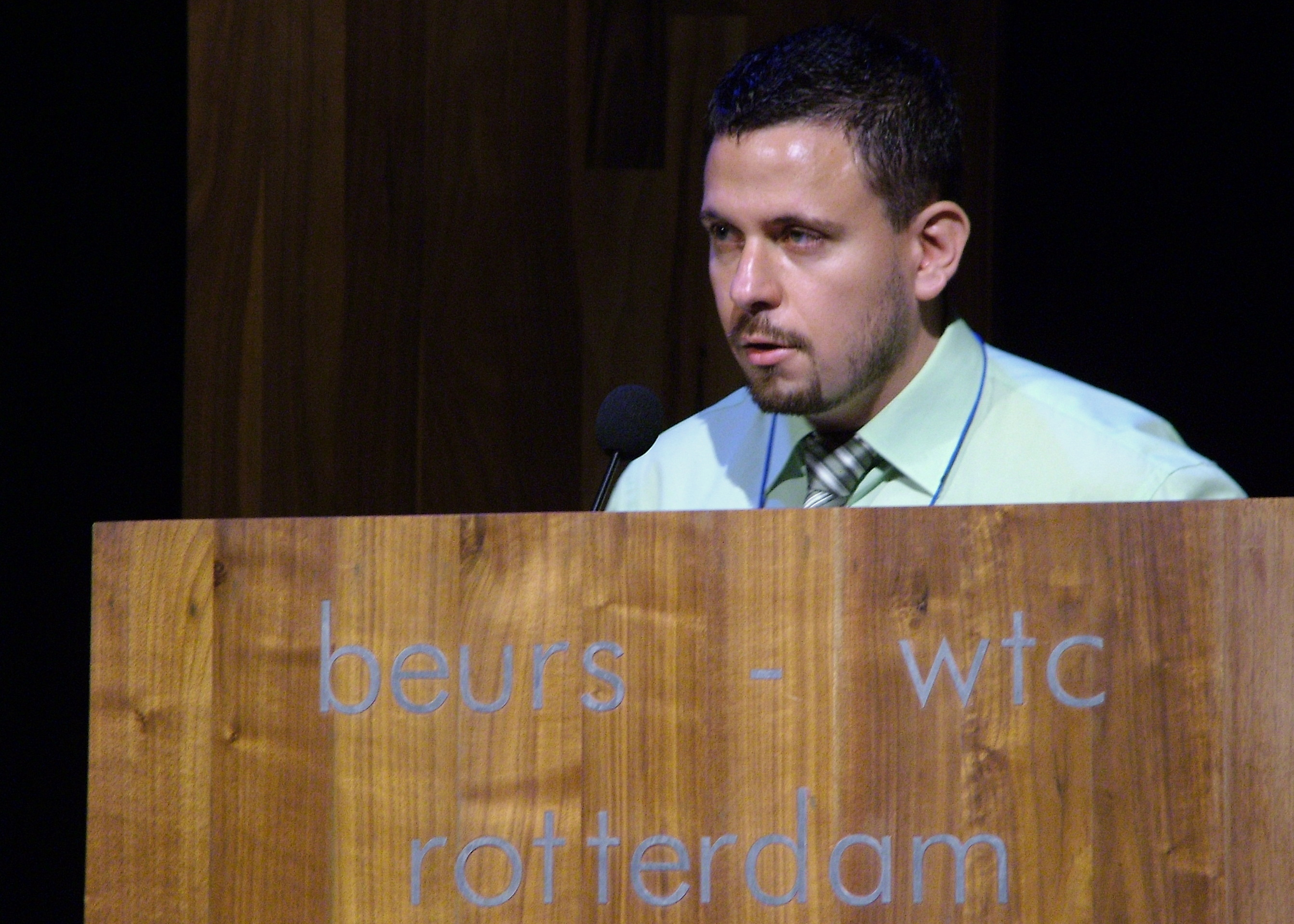 Universala Kongreso de Esperanto, Roterdamo 2008. Fermo. KKS Clay Magalhaes.